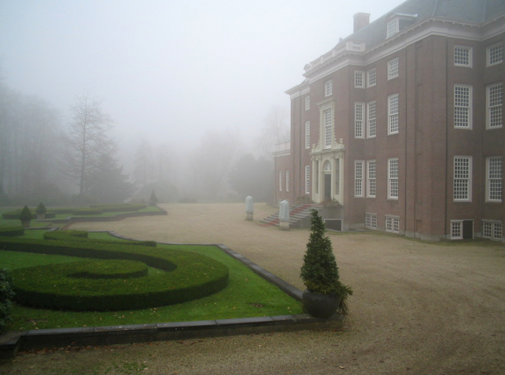 slot Zeist in de mist, 2004